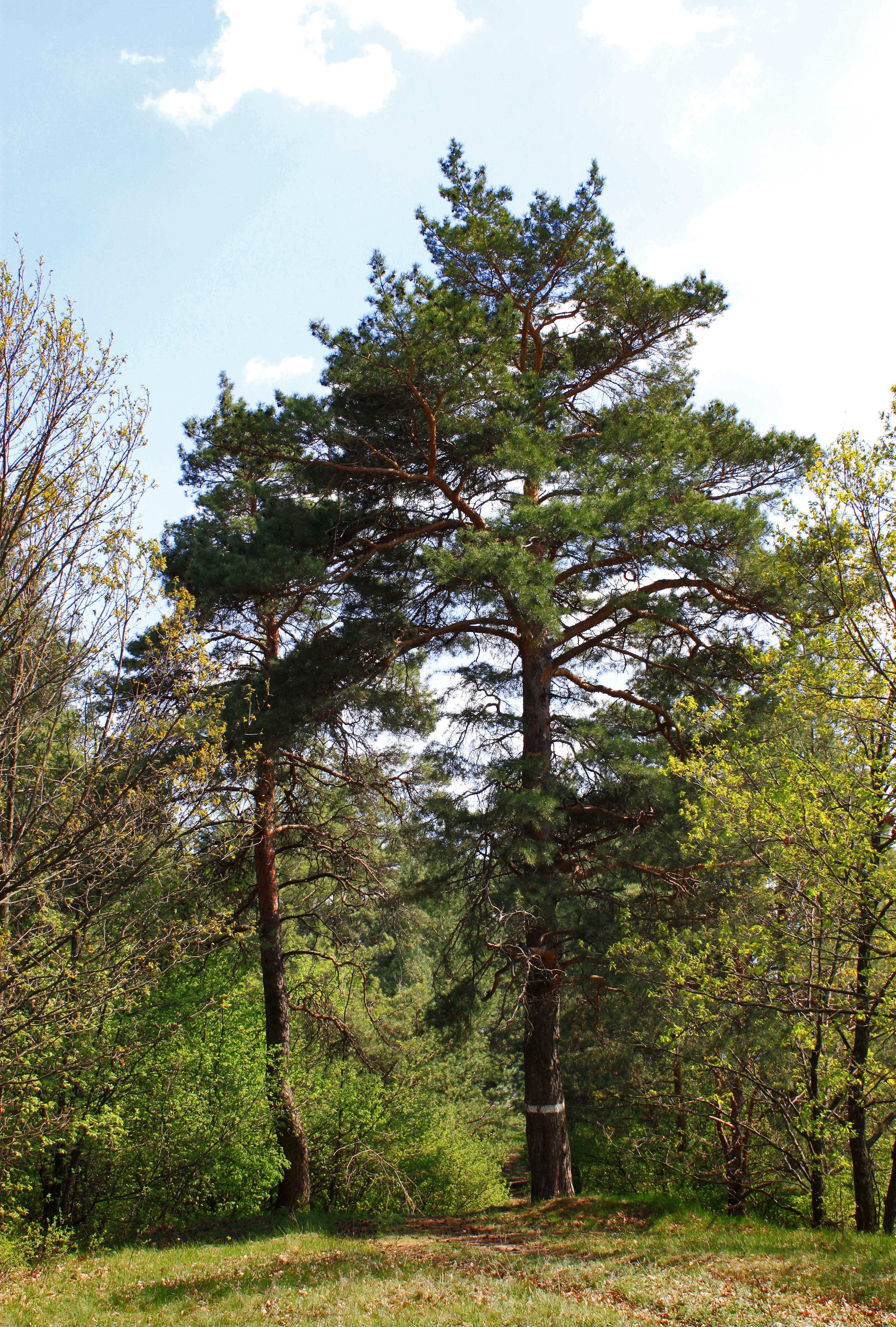 Особо охраняемая природная территория «Бекарюковский бор». Шебекинский район Белгородской области.